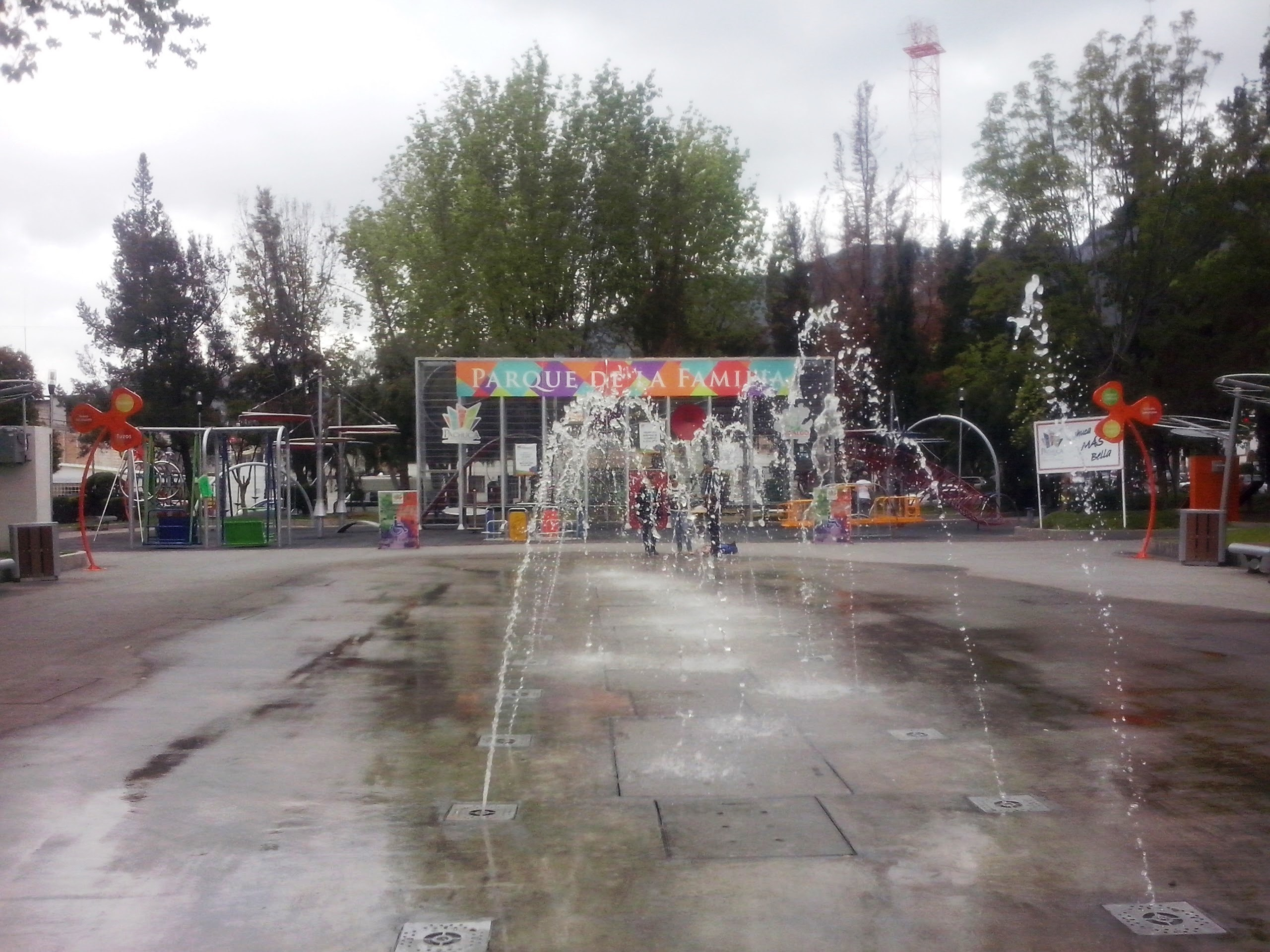 Parque de la Familia en Pachuca, Hidalgo